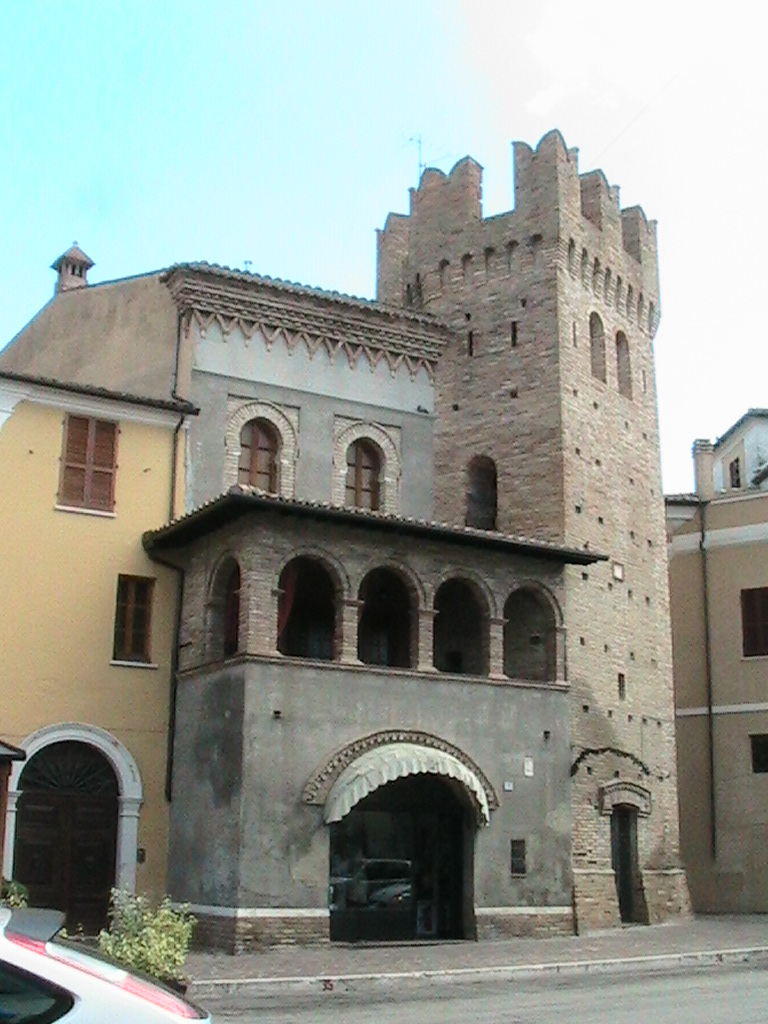 Mosciano Sant'Angelo - Palazzetto loggiato